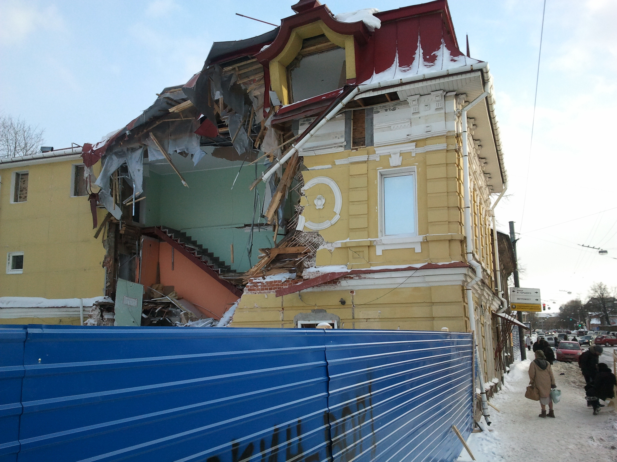 Нижний Новгород. Дом купчихи Гузеевой, кон. 19 — нач. 20 вв (ул. Ильинская, 126). В конце марта 2013 года начался снос здания, приостановленный в связи с протестами общественности. Зданию так и не был присвоен статус объекта культурного наследия, и в сентябре 2013 его снесли.